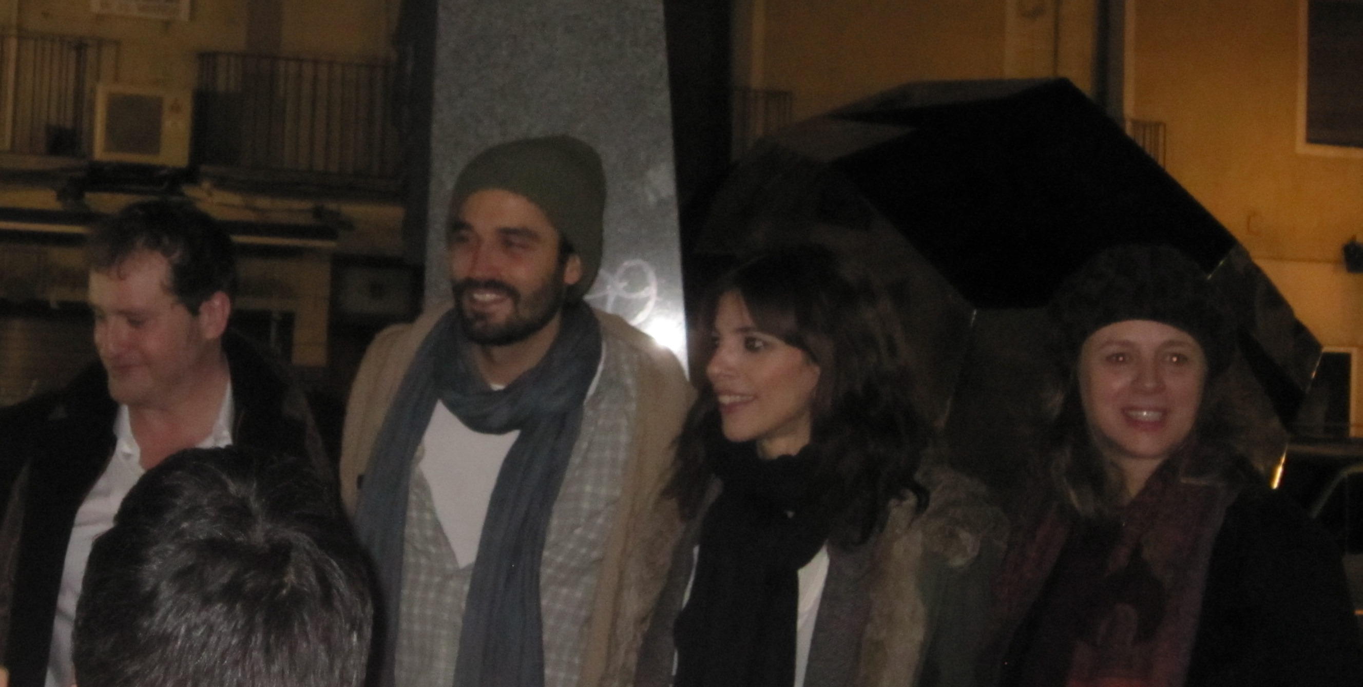 Maribel Verdu y Emma Suarez. TEATRO Principal de Zaragoza. Enero de 2014